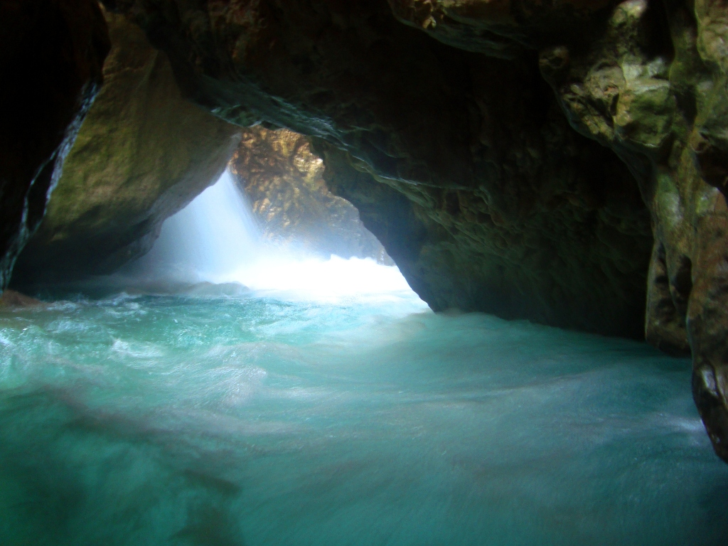 نمايي از تنگ مهريان